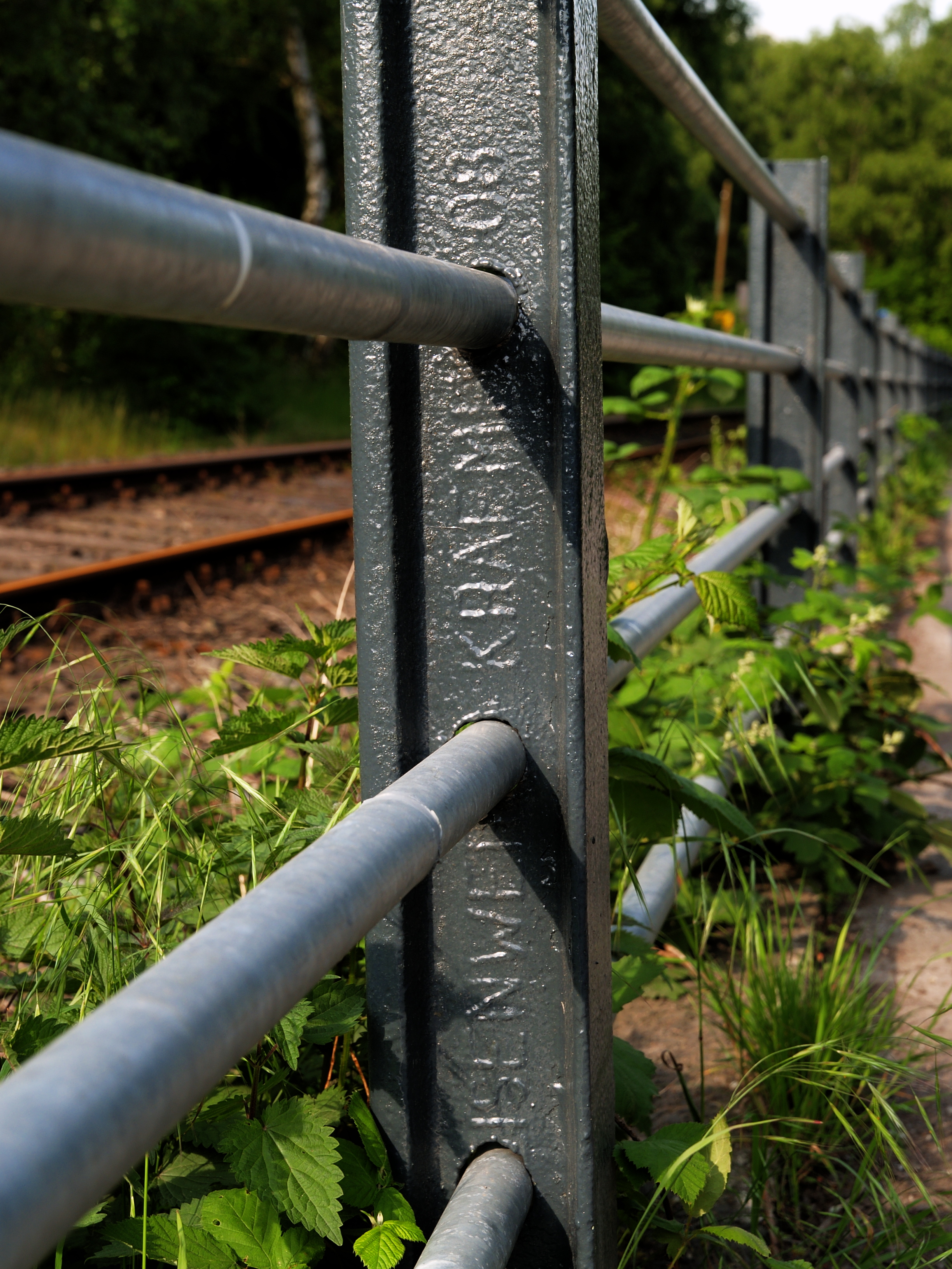 Sicherheitszaun mit Schienenelementen (gewalzt 1908 im Eisenwerk Kraemer, St. Ingbert) an der Ruhrtalbahn an der Muttentalstraße in Witten-Bommern (in der Nähe des LWL-Industriemuseums Zeche Nachtigall)